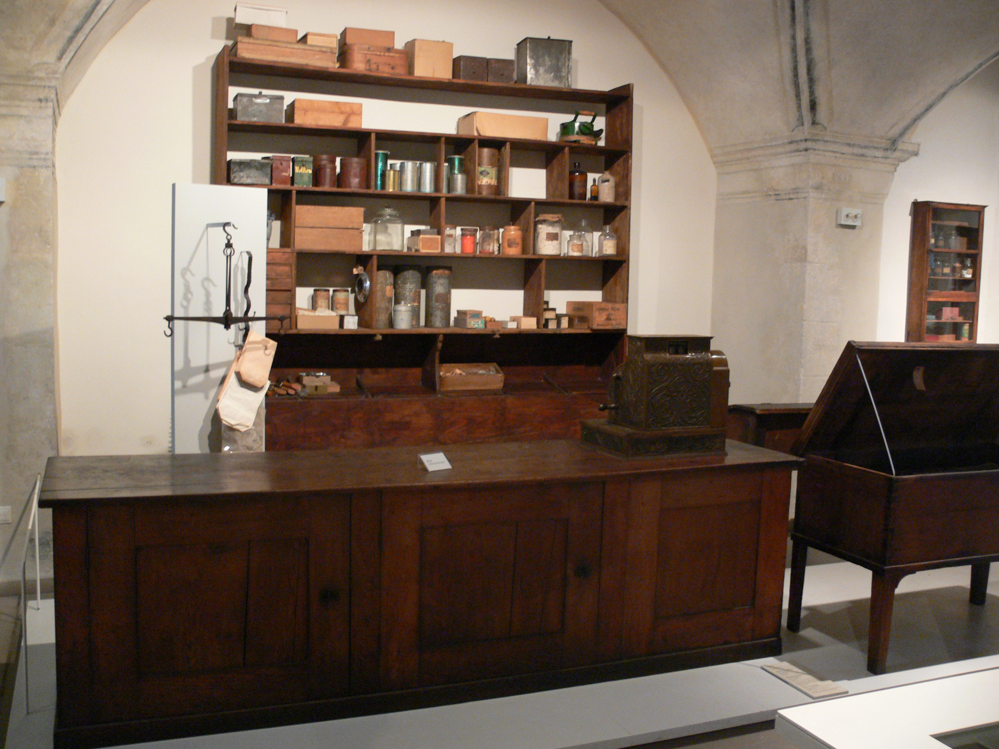 Historische Ladeneinrichtung Landesmuseum Württemberg (Außenstelle Museum für Volkskultur in Württemberg, Waldenbuch)